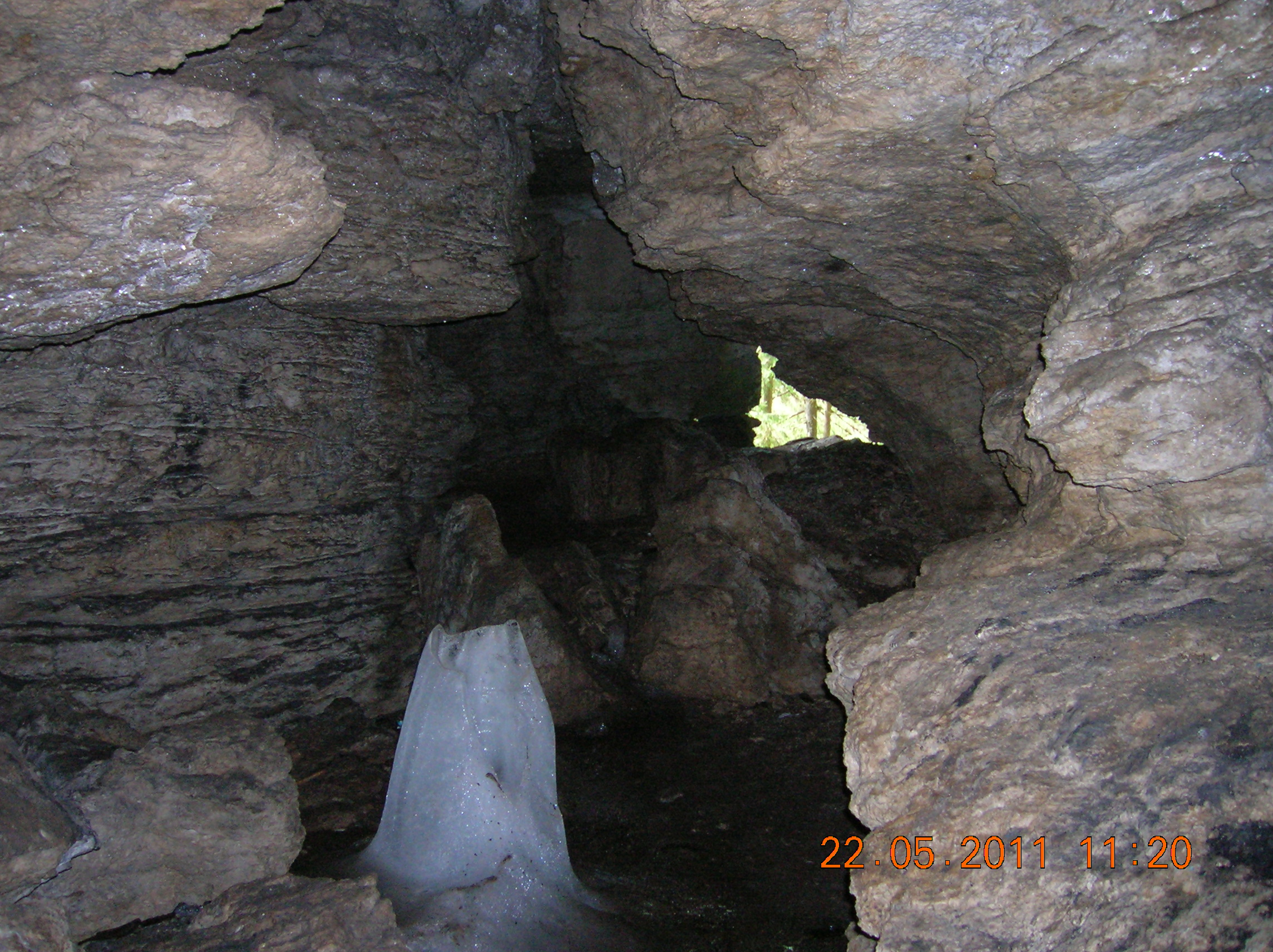 Jud. Harghita, Oraş Borsec, Rezervaţia Scaunul Rotund, Peştera de gheaţă